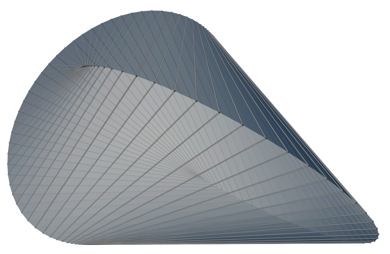 Liggende oloïde met ribben om de 6 graden; vlakken 27% transparant